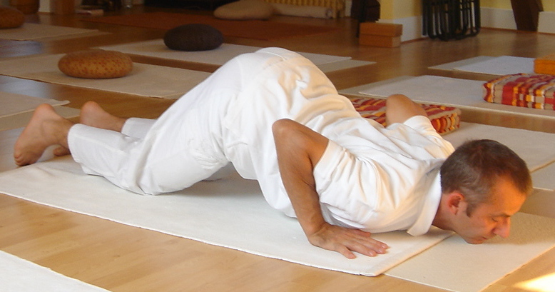 Yoga postures